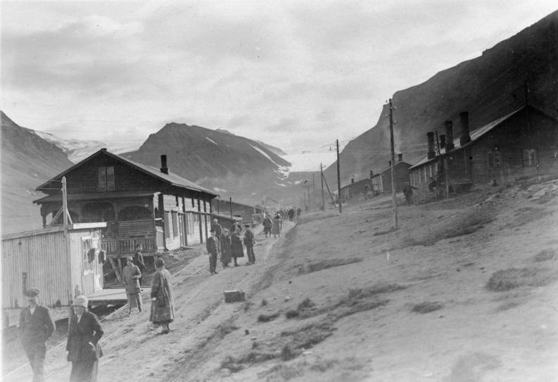 Polarfahrt mit dem Dampfer "München".- Das Dorf Advent-Bay (Kohlengruben) 17. Juli - 12. August 1925 Information added by Wikimedia users.